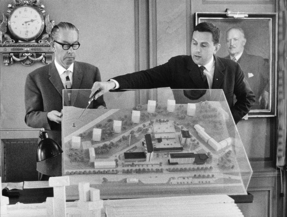 Stadsarkitekt Börje Wehlin (1921-2000) visar en modell av Tumba centrum för kommunalnämndens ordförande i Botkyrka kommun Ernst Blom (till vänster).